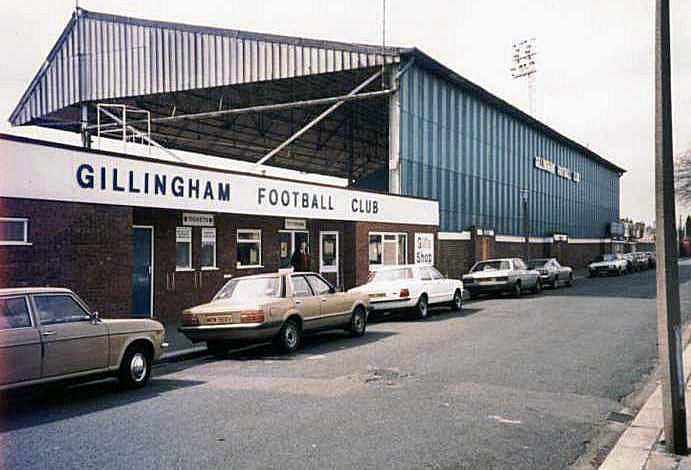 Priestfield Stadium, Gillingham, Kent, England